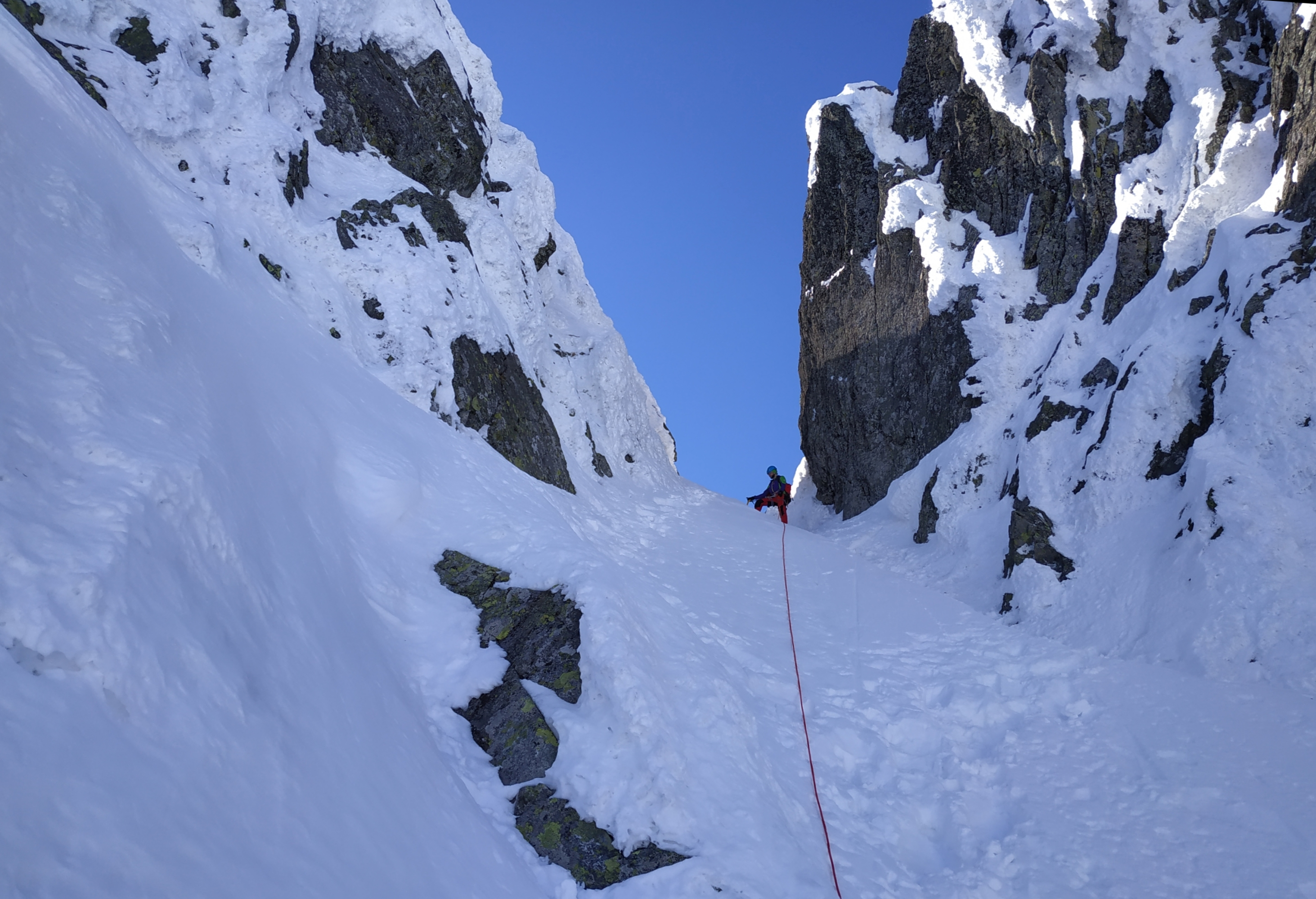 Zmarzła Przełączka Wyżnia